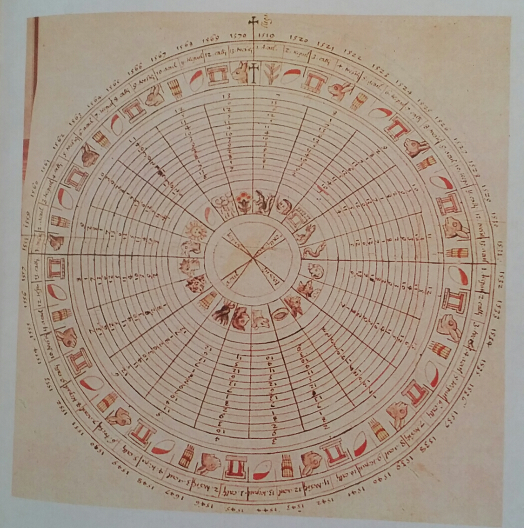 Rueda calendárica elaborada por Fray Francisco de las Navas en 1551 y anexada a la "Descripción de la ciudad y provincia de Tlaxcala" de Diego Muñoz Camargo en 1584. La rueda explica la manera de contar los años, a la vez es un mecanismo para obtener fechas de días indígenas correlacionadas al calendario cristiano.